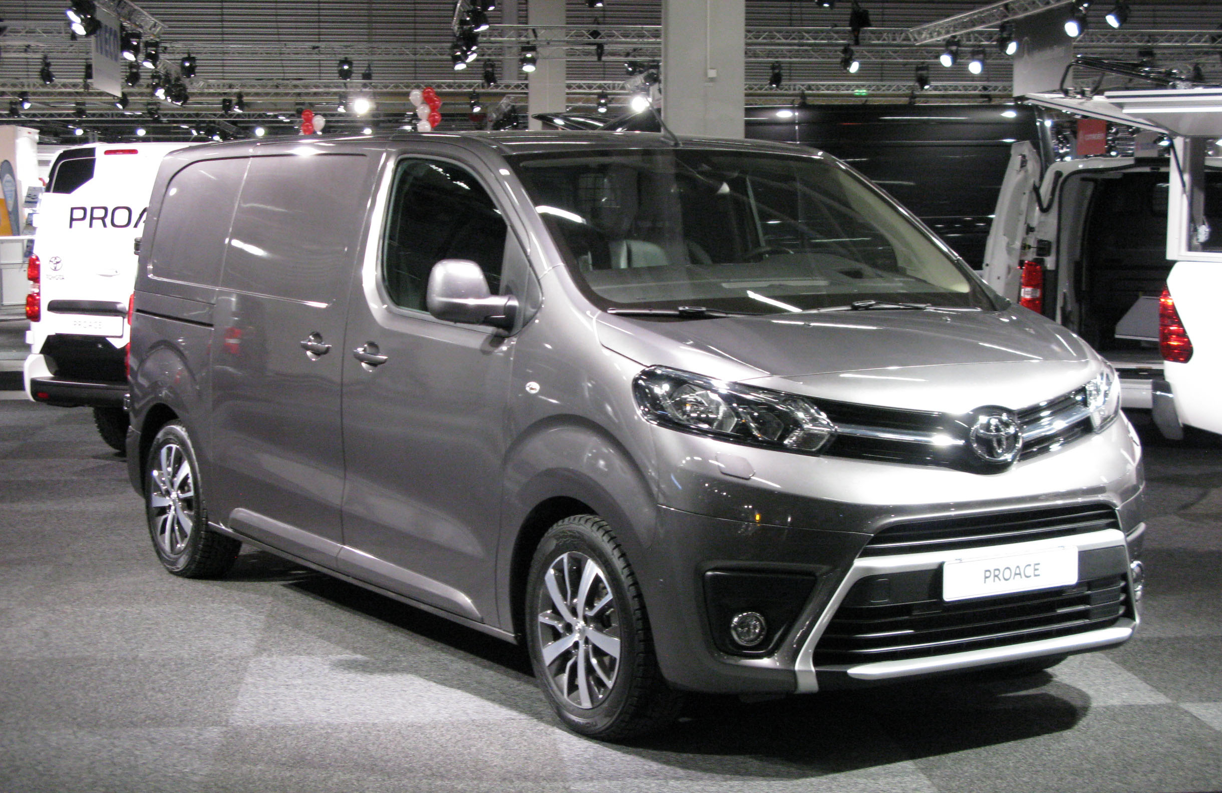 2017 Toyota ProAce